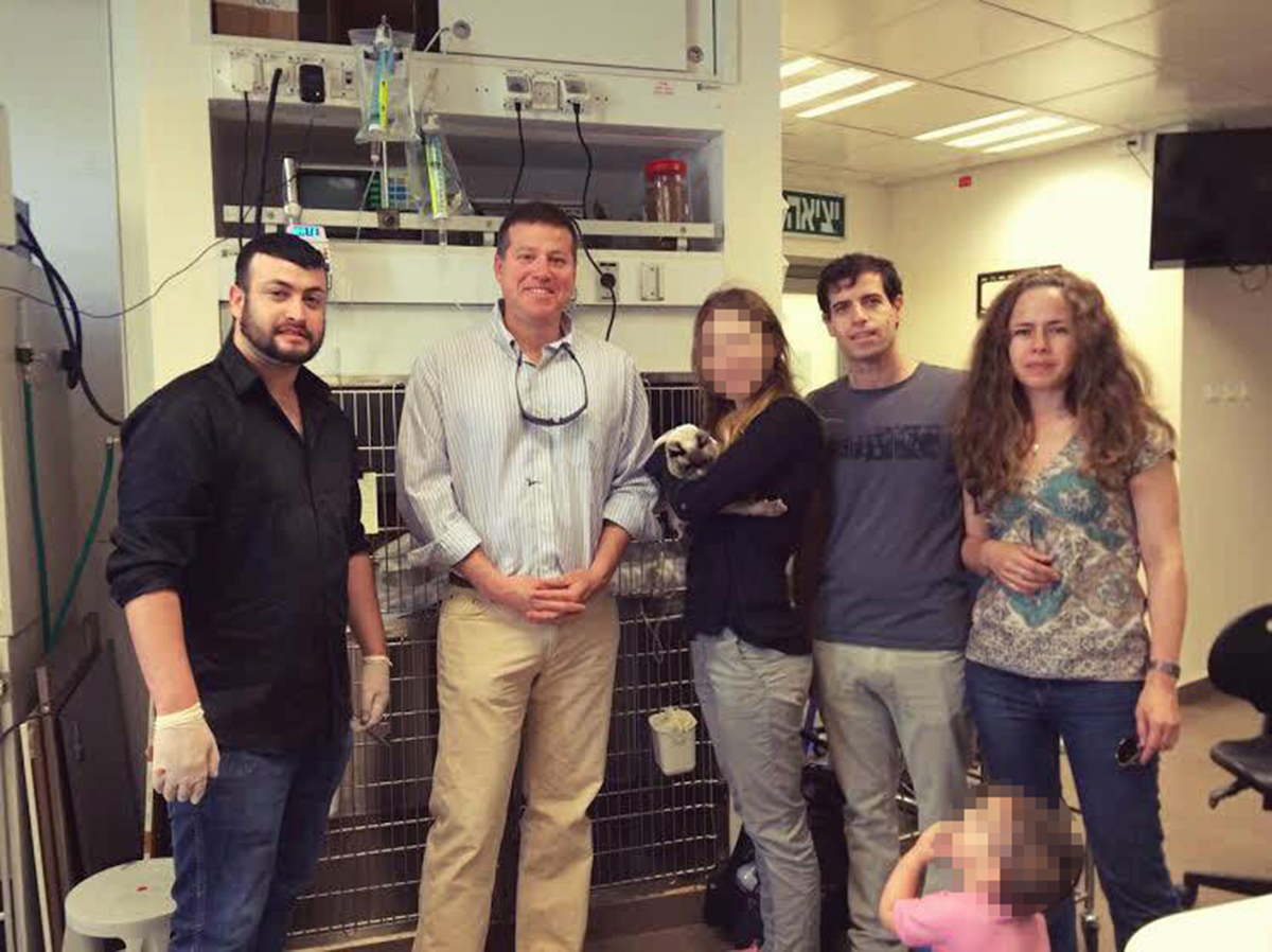 פבל פליט והצוות הרפואי האחראי על השתלת הכליות הראשונה בישראל בחתולים.